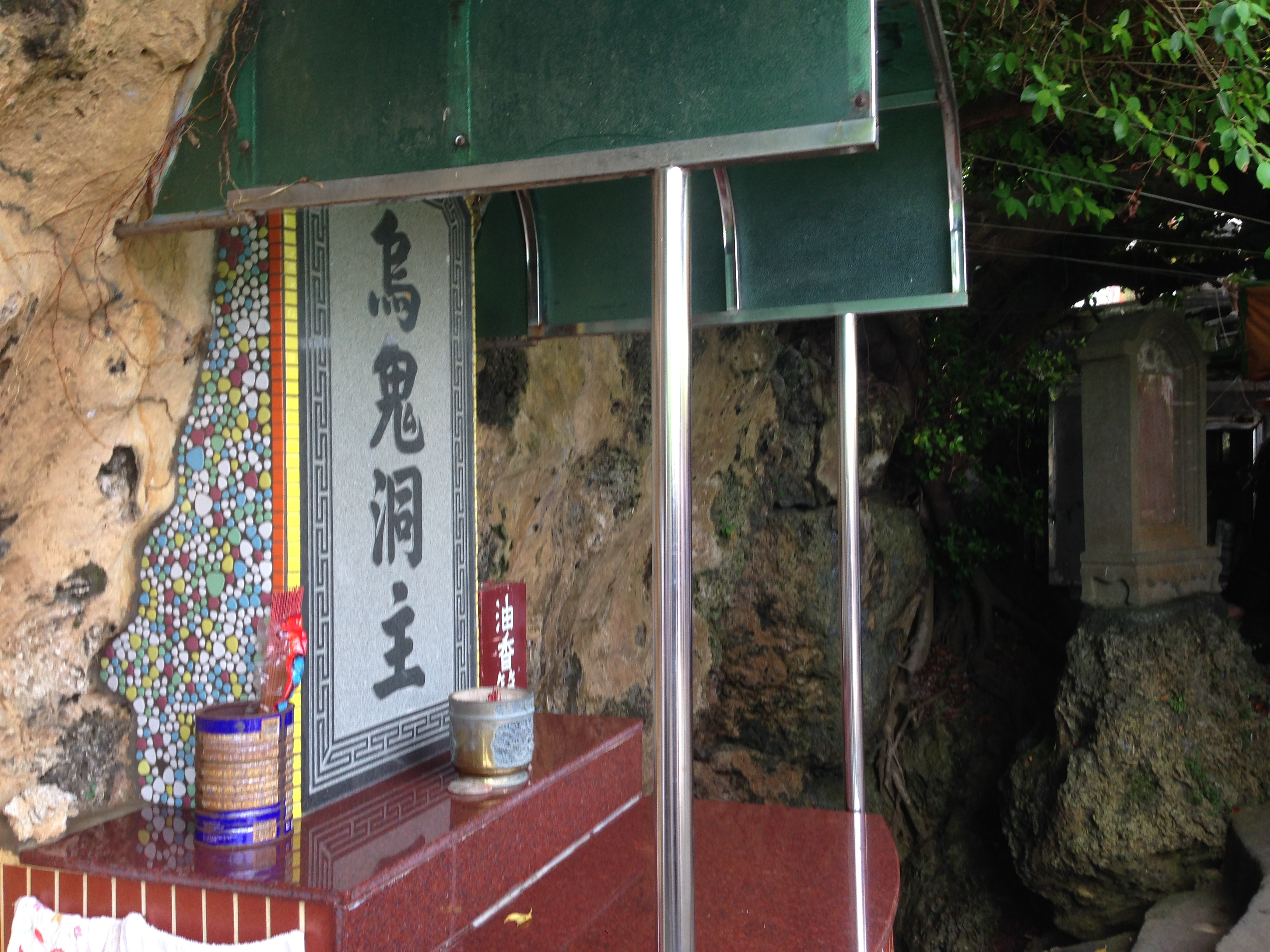 中文（台灣）: 烏鬼洞出口、烏鬼洞主牌位與烏鬼洞風景區記事碑